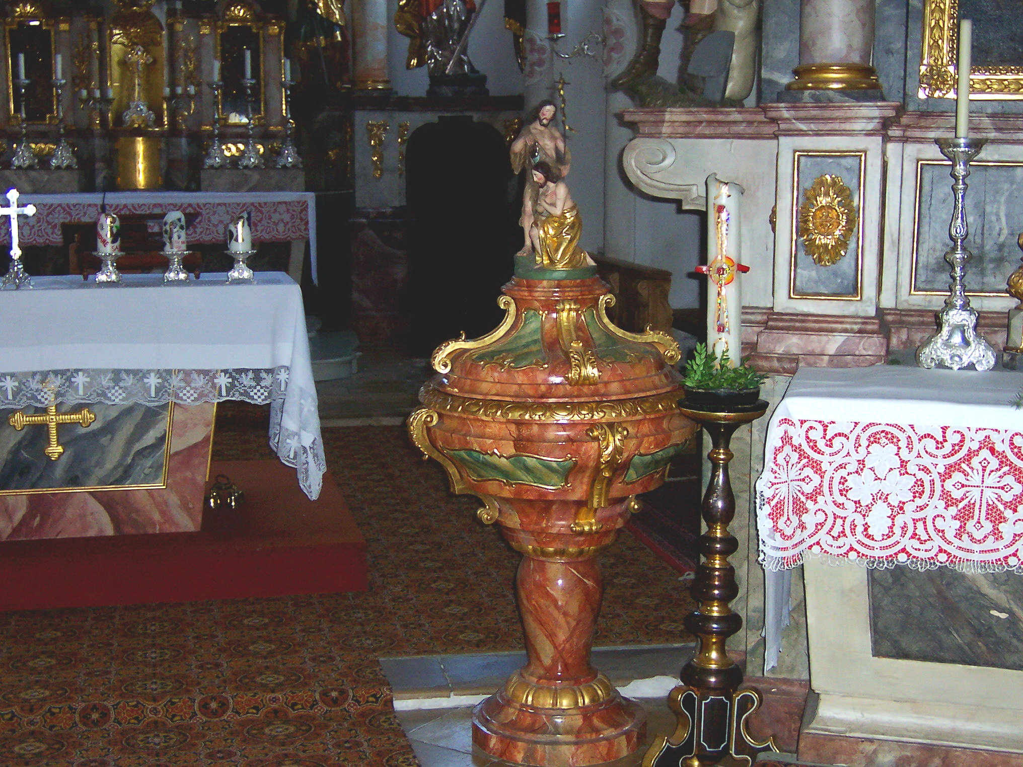 Essenbach, Rathausplatz 13. Katholische Kirche Mariä Himmelfahrt. Saalbau mit später angefügten Seitenschiffen, heute Staffelhalle, spätgotischer Bau um 1470, durch Seitenschiffe um 1670 und nochmals 1713 erweitert, im Kern romanischer Turm, spätgotisch erhöht, zunächst freistehend, 1713 in das südliche Seitenschiff integriert. Barockes Taufbecken.